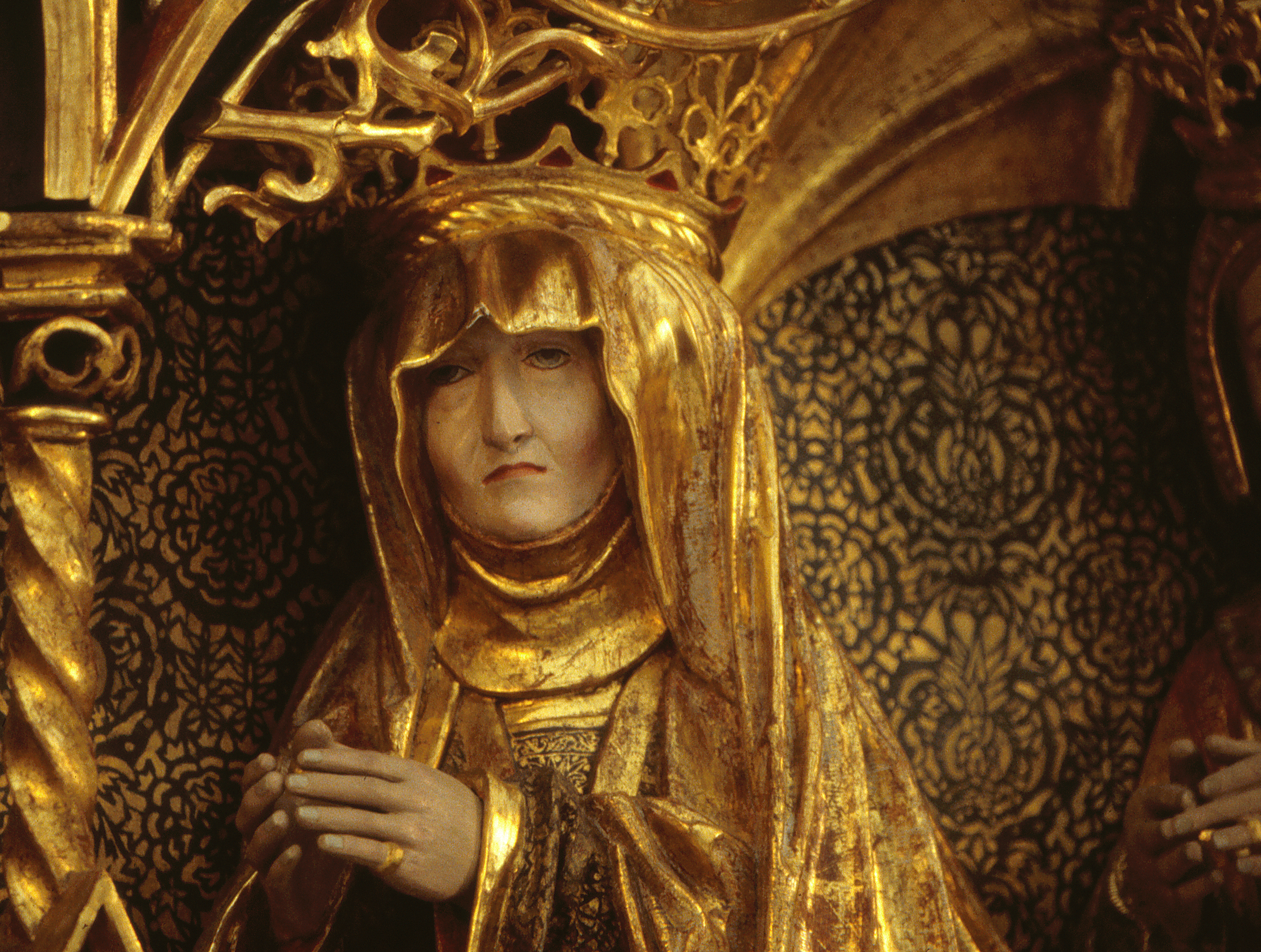 Drottning Christine av Danmark, kung Hans hustru ca 1515.